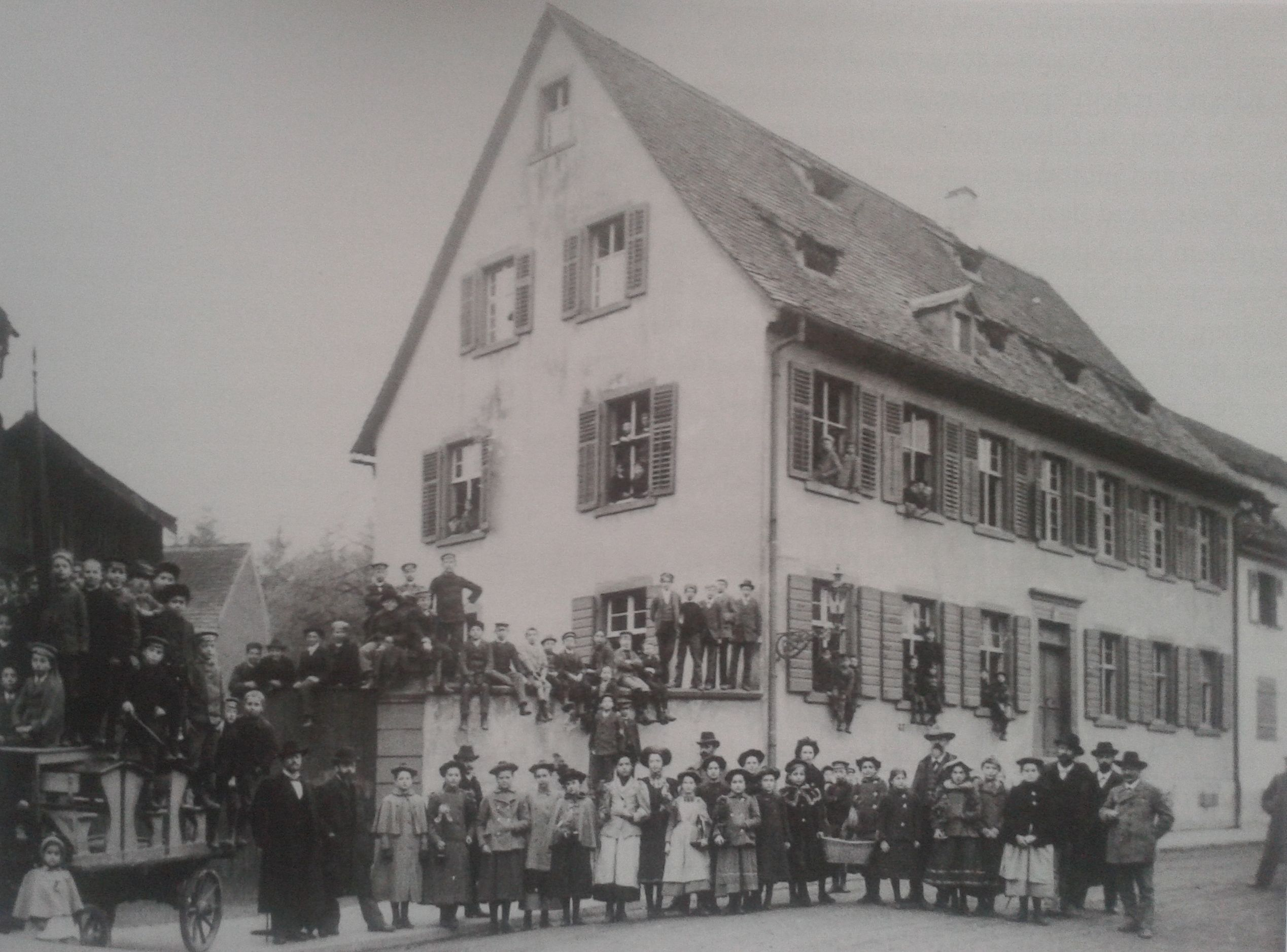 Realschule Emmendingen, Hebelstraße 1, Umzug in die neue Karl-Friedrich-Schule, 1902.